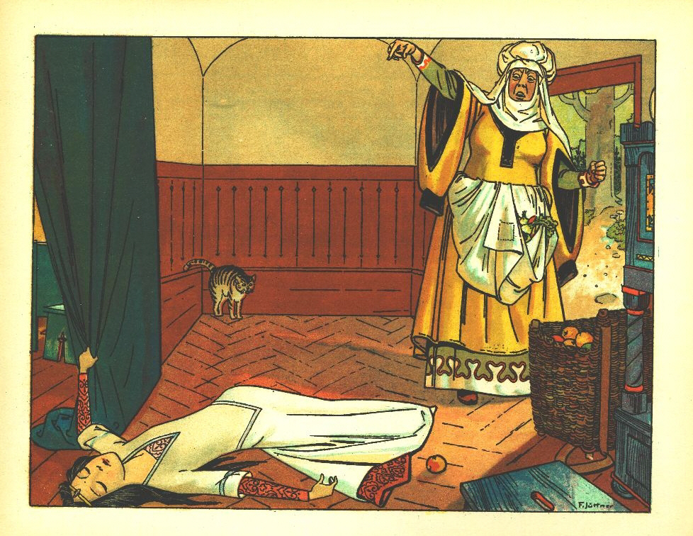 Franz Jüttner (1865–1925): Illustration from Sneewittchen, Scholz' Künstler-Bilderbücher, Mainz 1905